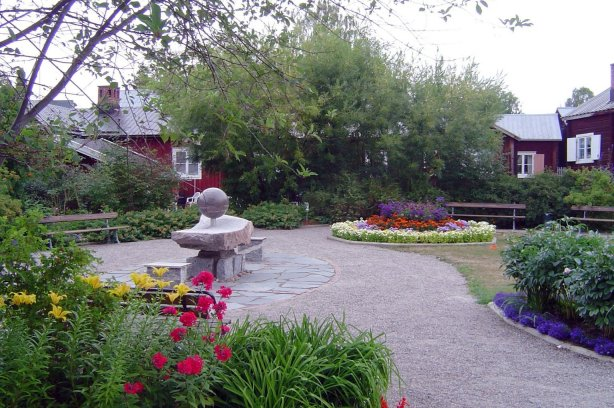 Bild av Solanderparken i Öjebyn